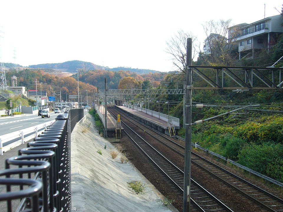 能勢電鉄一の鳥居駅 駅北方、国道173号沿いから南望